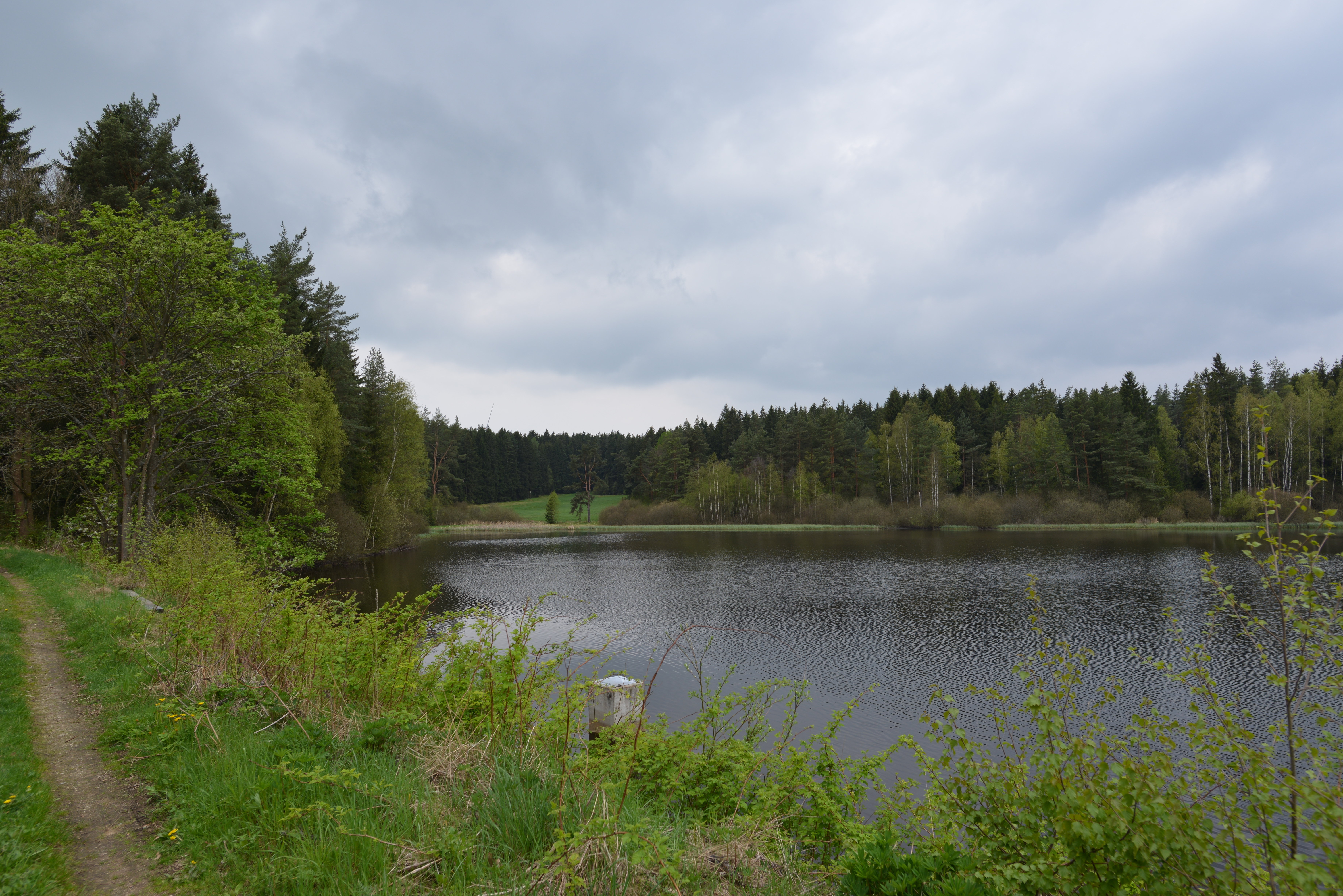 (NSG:BY-NSG-00478.01)_Brutteich und Brutwiesen bei Neuhaus a.d. Eger